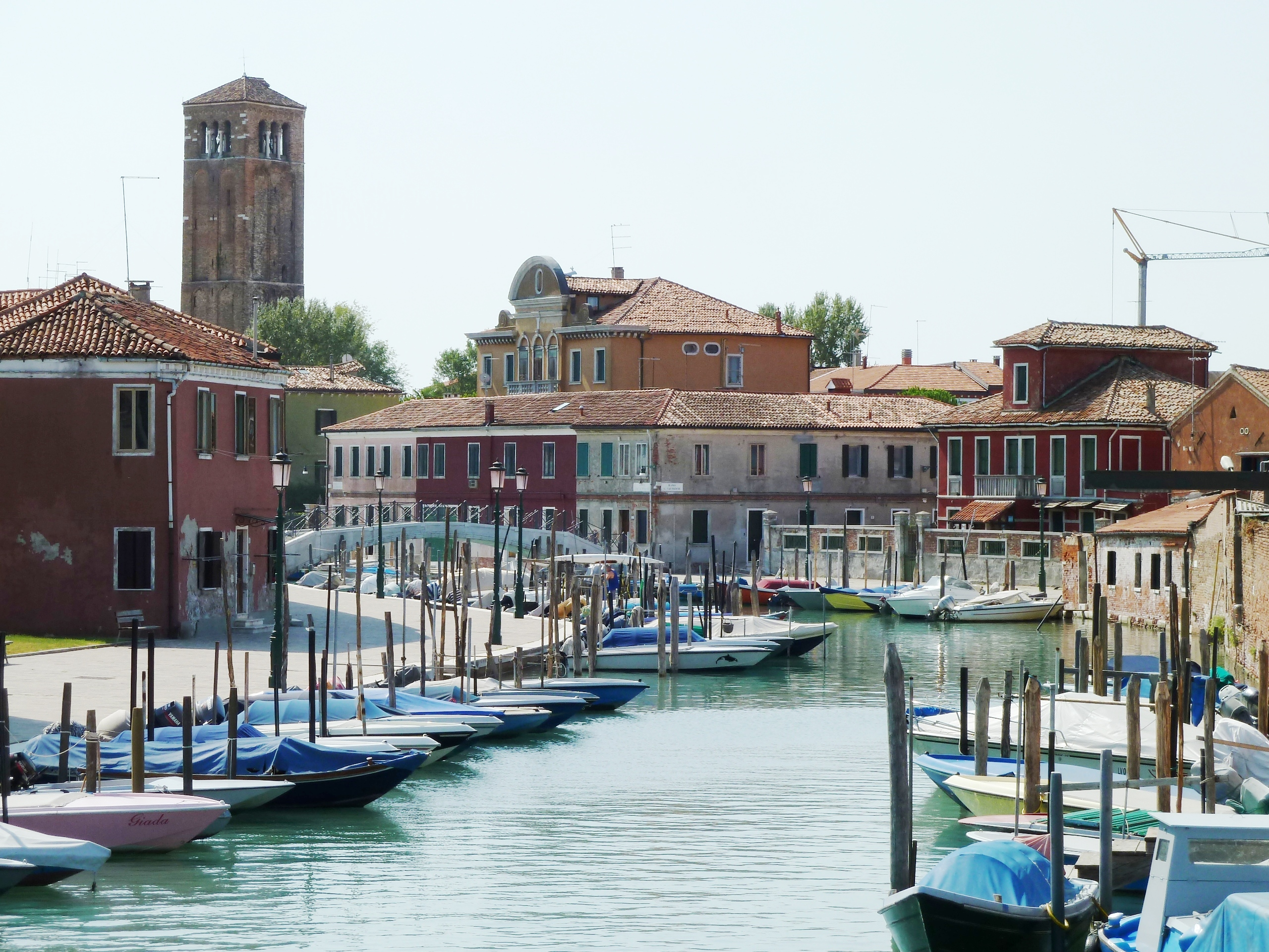 Canale san donato verso sud